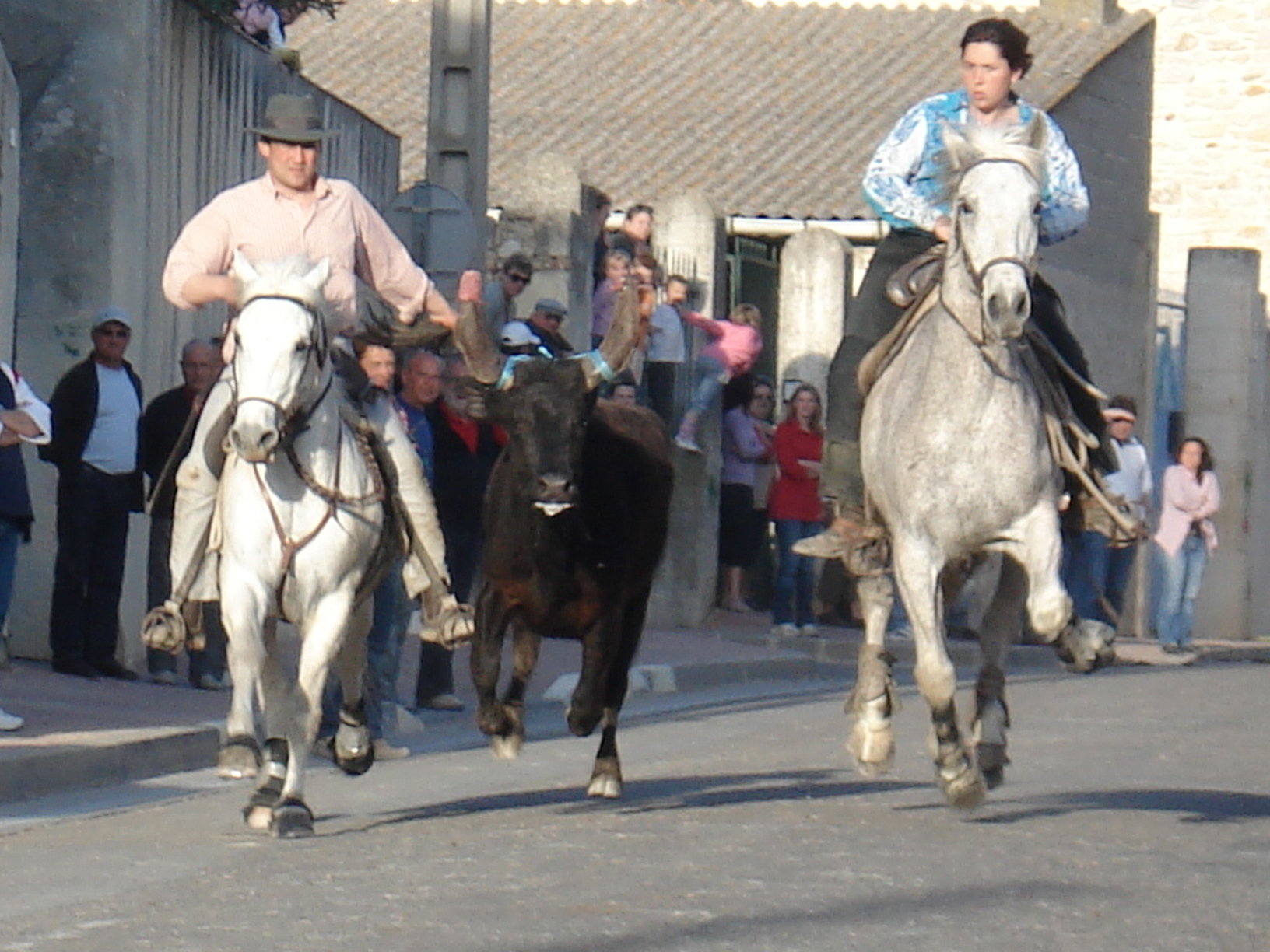 Lacher de Taureaux à Beauvoisin (30) aprés la course libre